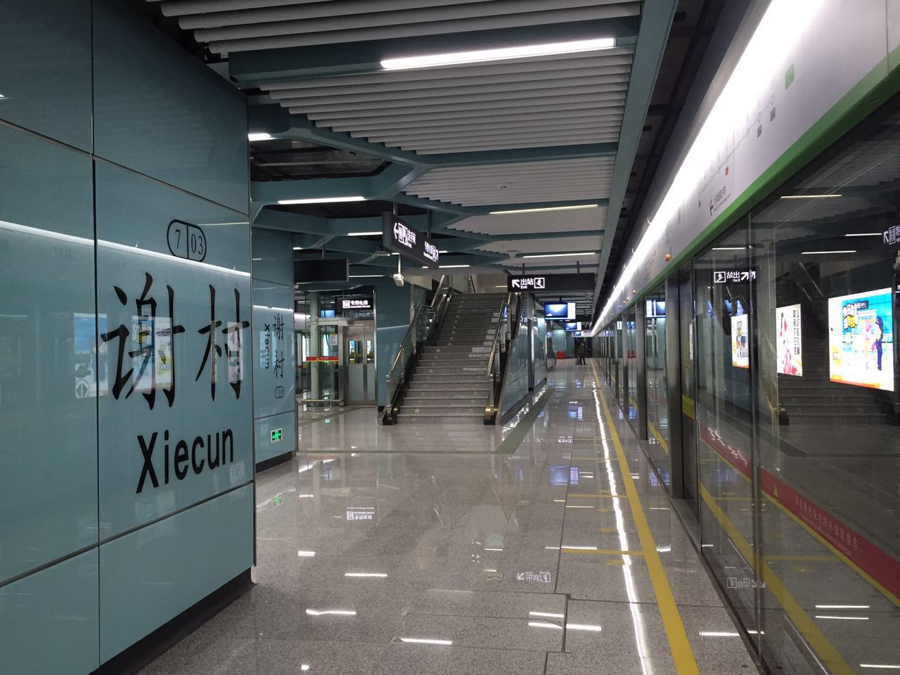 广州地铁谢村站